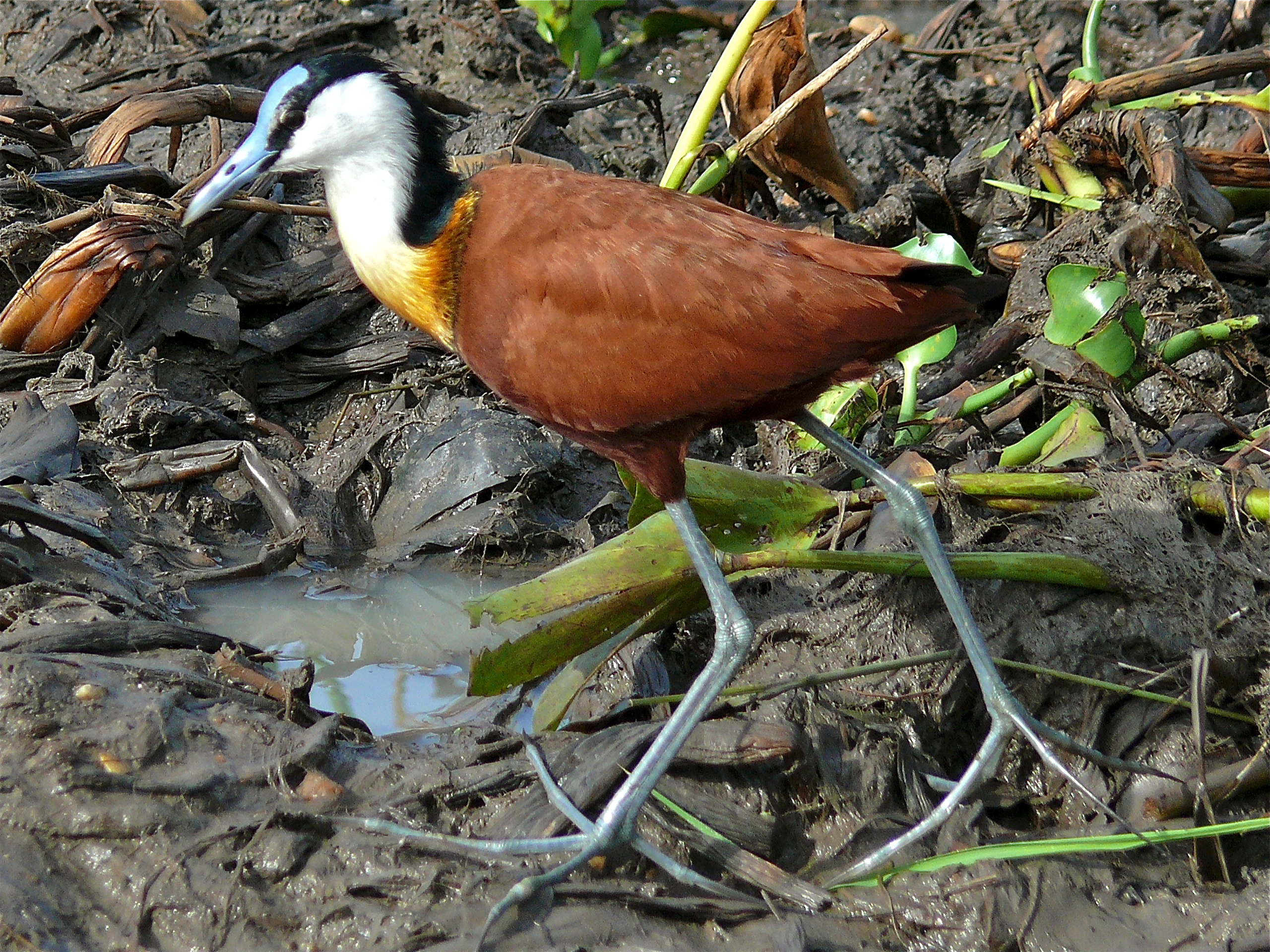 Murchison Falls NP, UGANDA